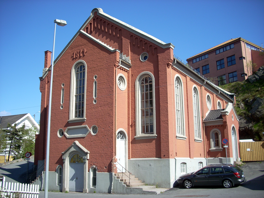 Kjerka kulturverksted i Arendal